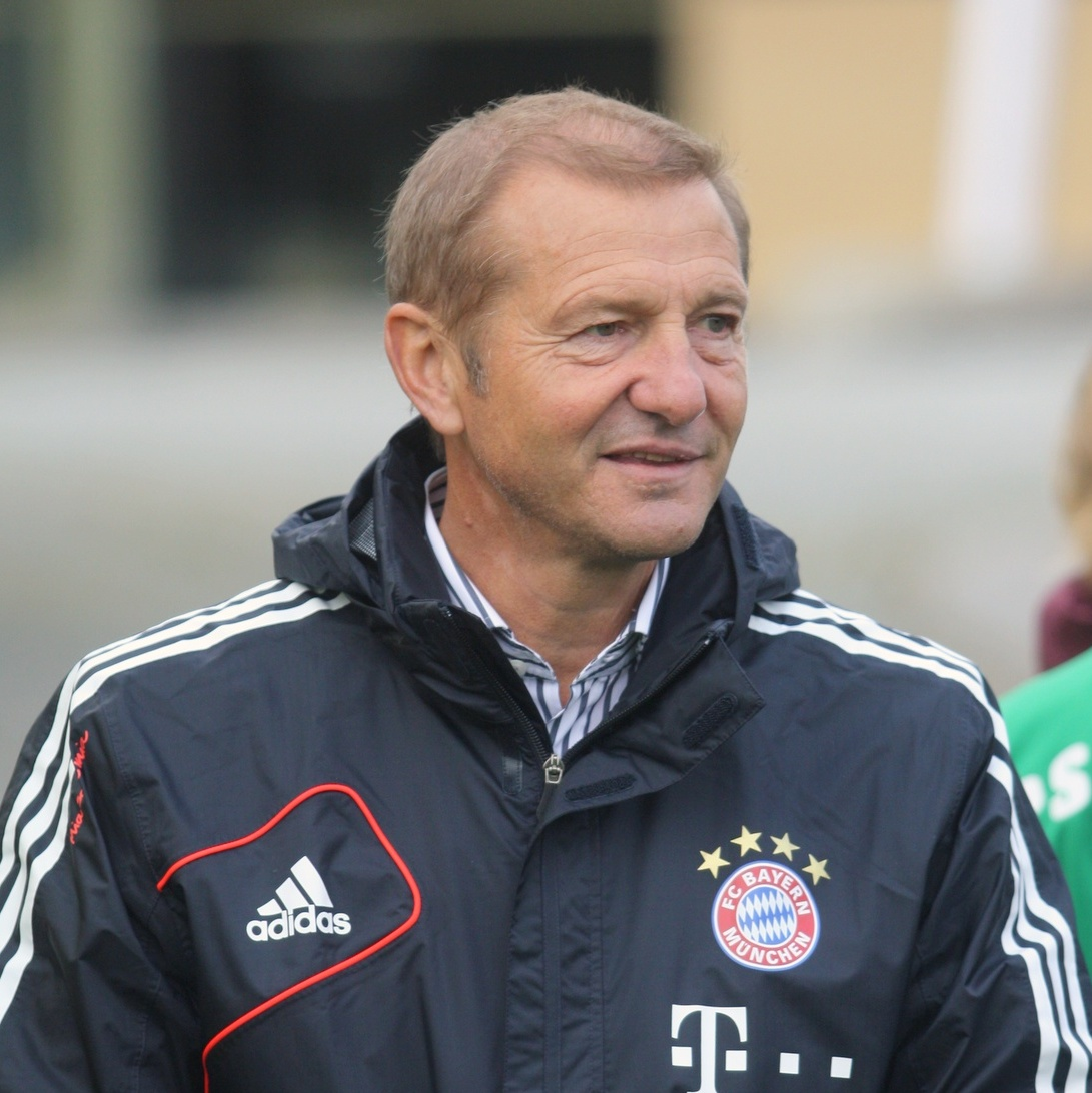 Wolfgang Dremmler, ehemaliger deutscher Fußballspieler. Hier am 19.09.2012 während des Endspiels der Blindenfussball-Bundesliga in München (quadratische Bildfassung) Titel des Werks: "Wolfgang Dremmler (2012)"